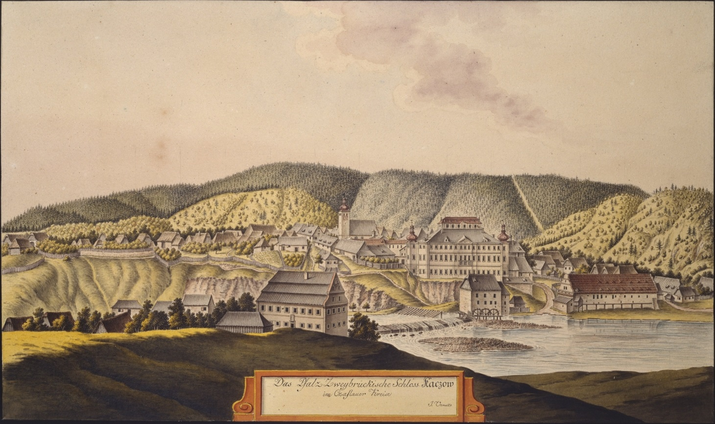 Zámek Kácov Das Pfalz-Zweybrückische Schloss Kaczow im Czaslauer Kreise. J. Venuto